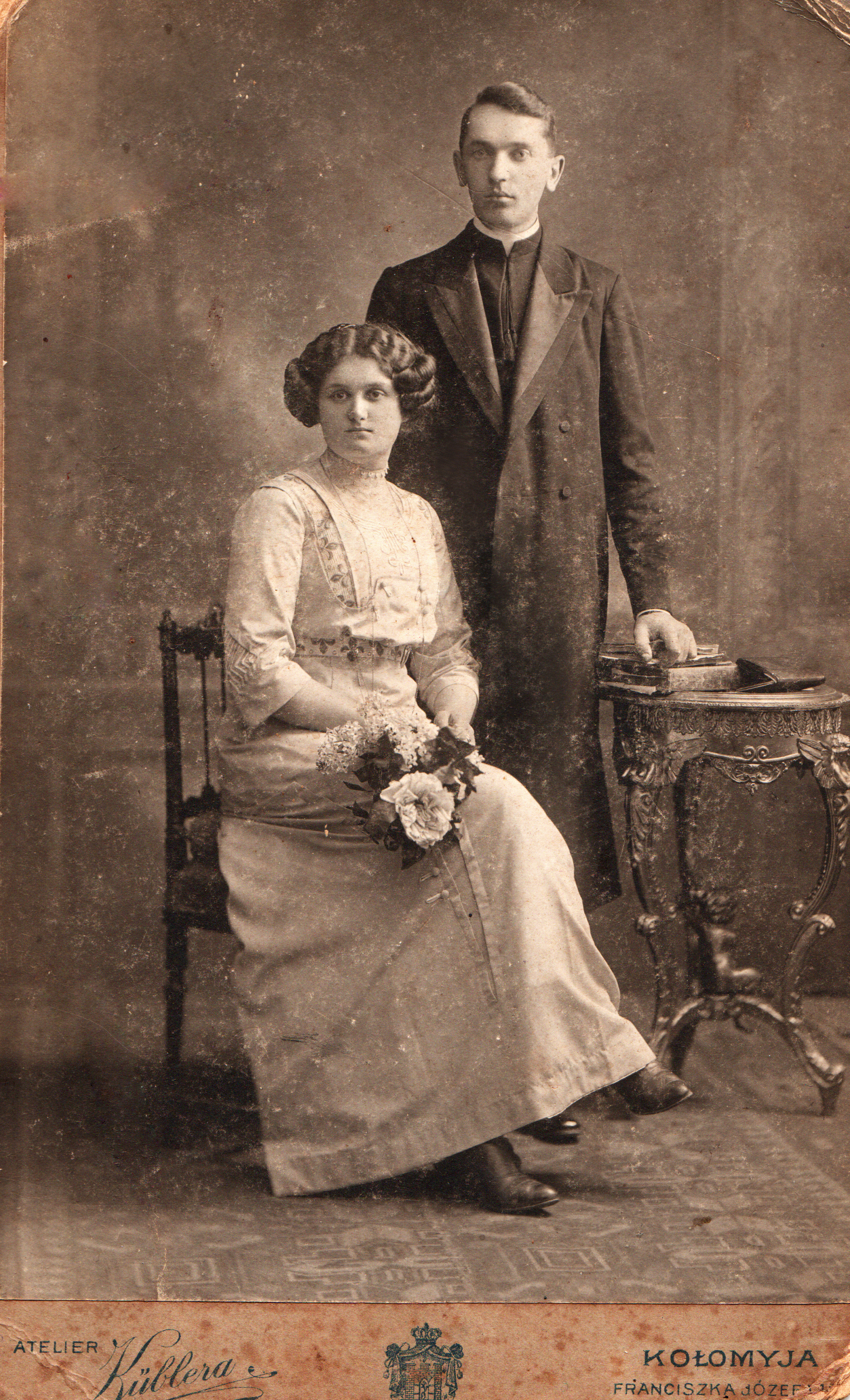 o. Vasy`l` Makovijchuk z yimosteyu Mariyeyu-Aureliyeyu 1915 r.